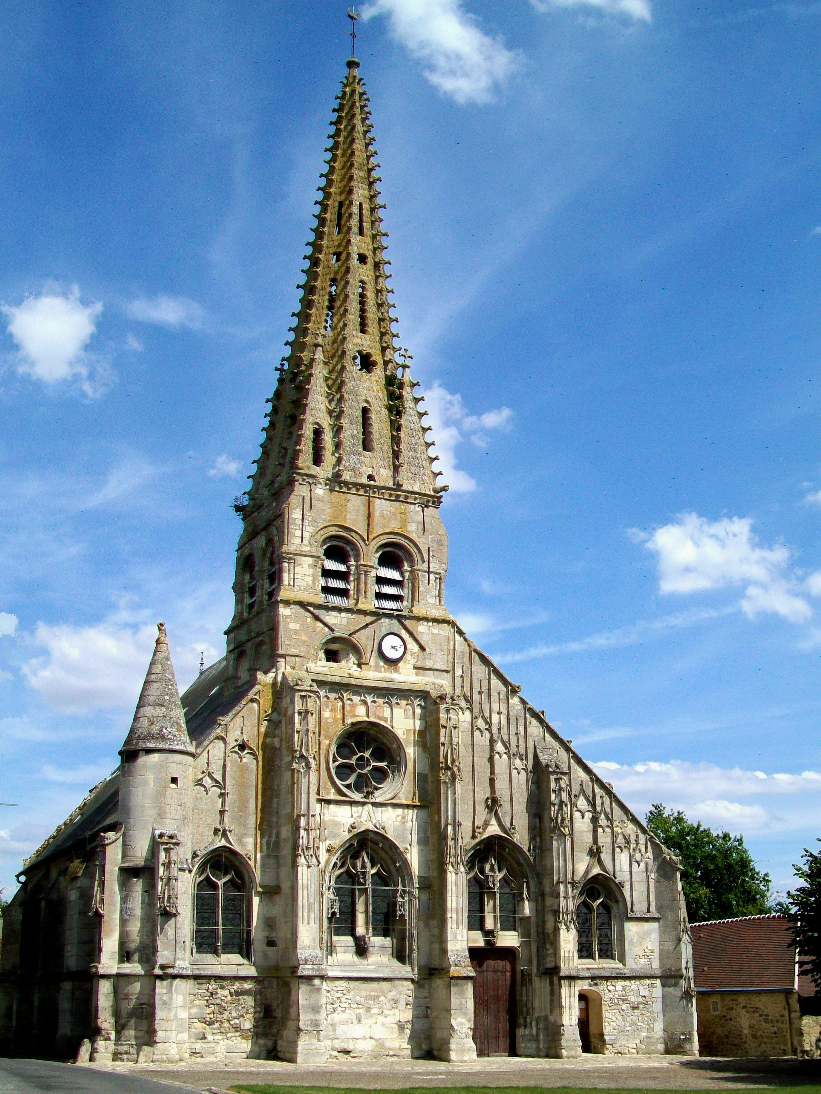 L'église Notre-Dame d'Ève (Oise).